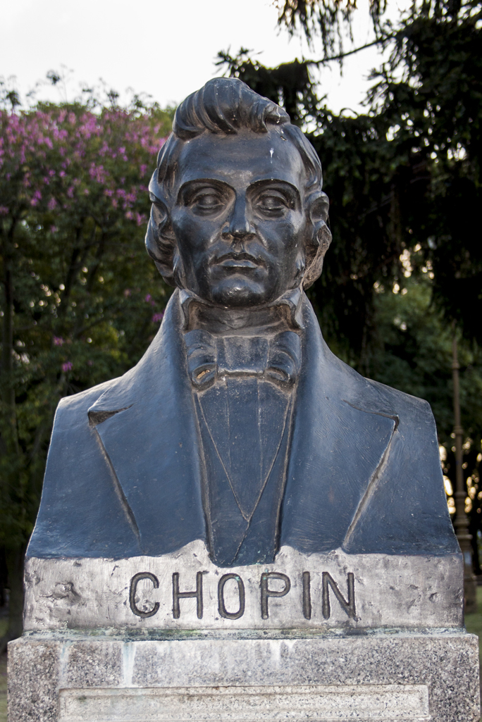 Federico Chopin (1930). Obra del escultor italiano Pedro Juan Ferrari (1884 - 1970) Inaugurada en el Parque Chacabuco el 22 de septiembre de 1944.